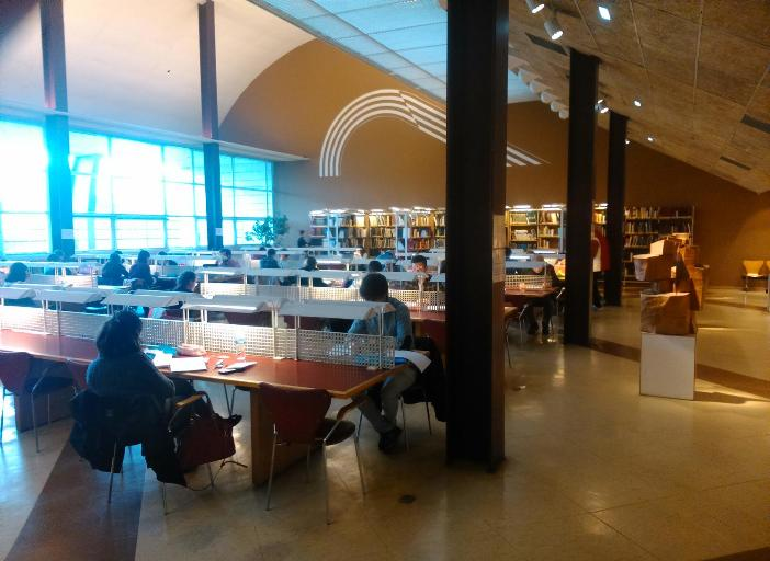 Servicio de Consulta de Adultos de la Biblioteca Pública Municipal Bances Candamo (Avilés, Asturias).